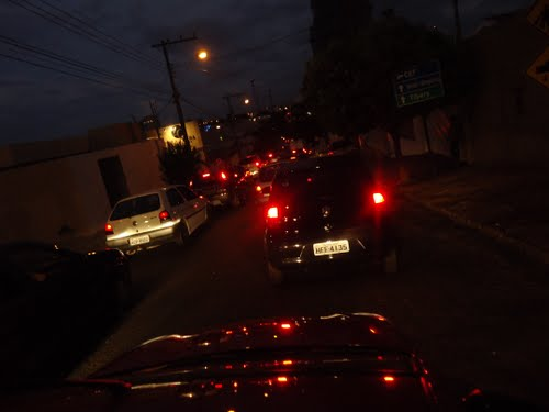 Trânsito parado na Rua Niterói, entre avenidas Rondon Pacheco e Cesário Alvim, no Aparecida, região central de Uberlândia.